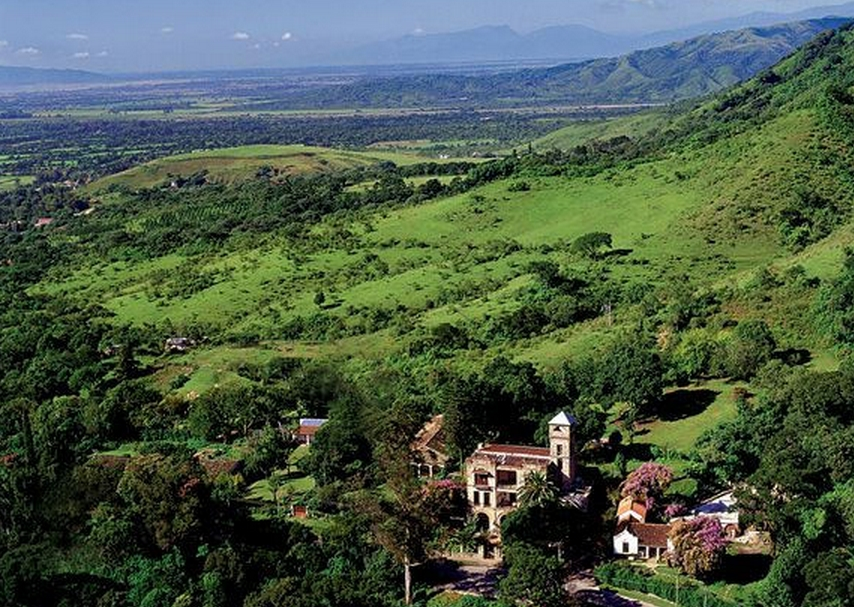 Villa san Lorenzo Salta vista aerea